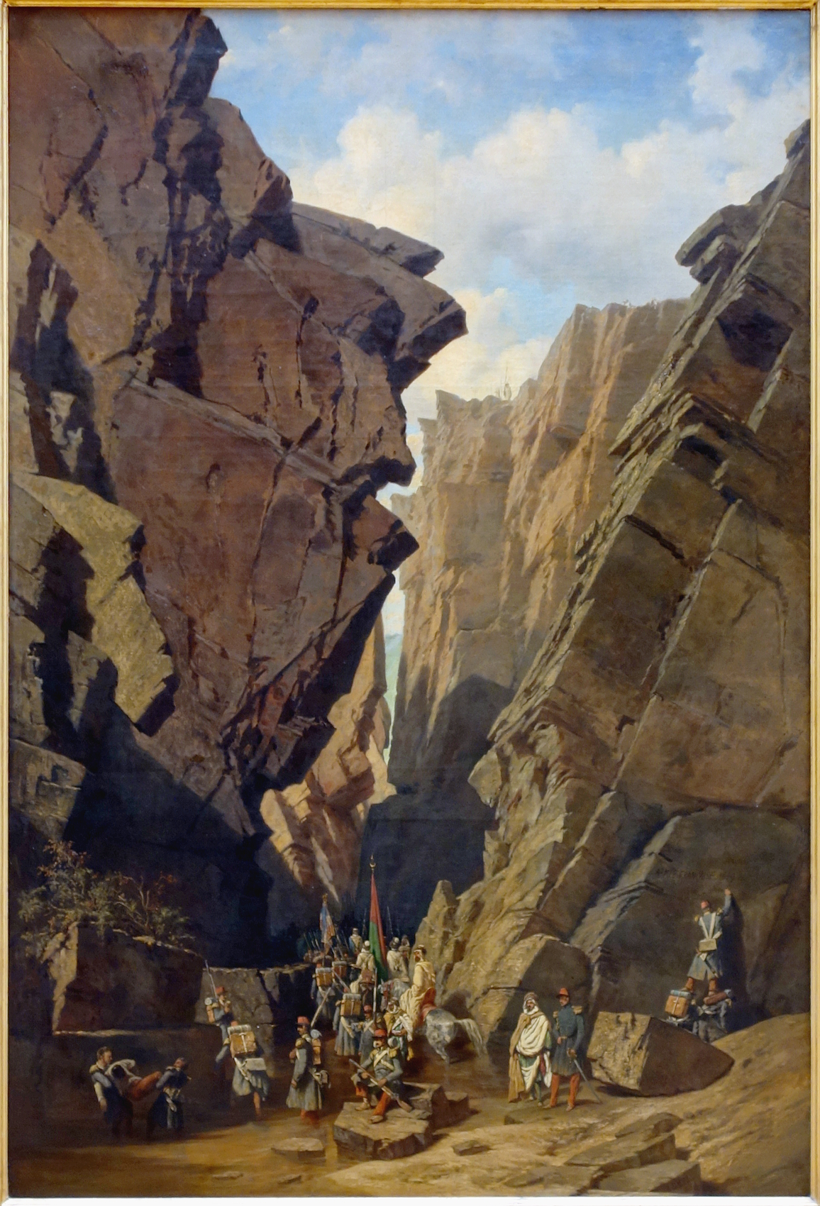 Le passage des Bibans ou Le passage des portes de fer au Palais des beaux-arts de Lille.